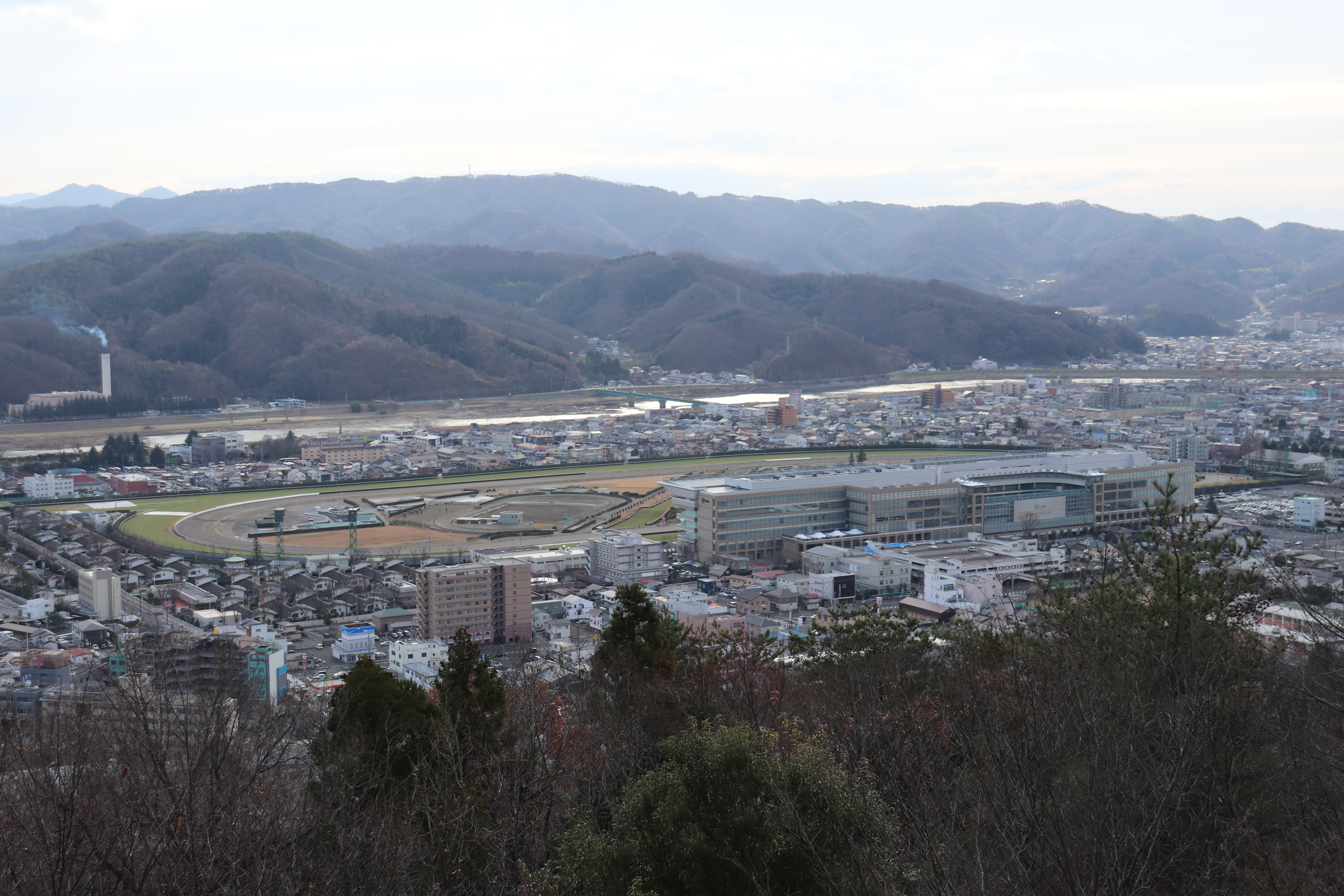 信夫山第2展望台から臨む福島競馬場及び福島市内